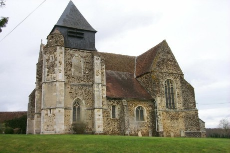 église de Charbuy, dans l'Yonne